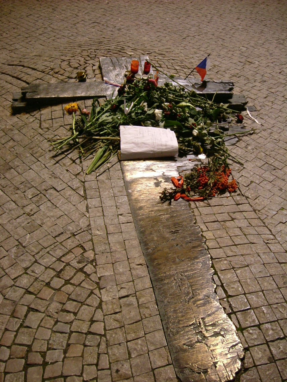 Das Denkmal für Jan Palach und Jan Zajic auf dem Wenzelsplatz in Prag